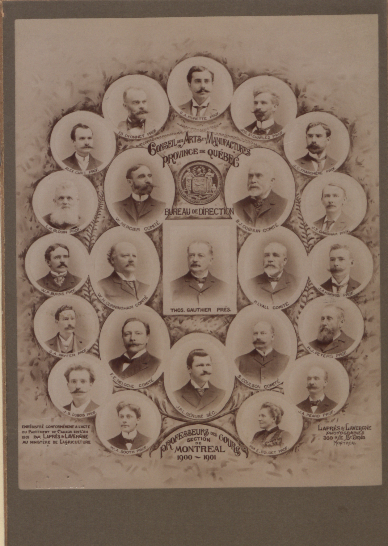 Le comite et professeurs du Conseil des Arts et Manufactures de Montreal.